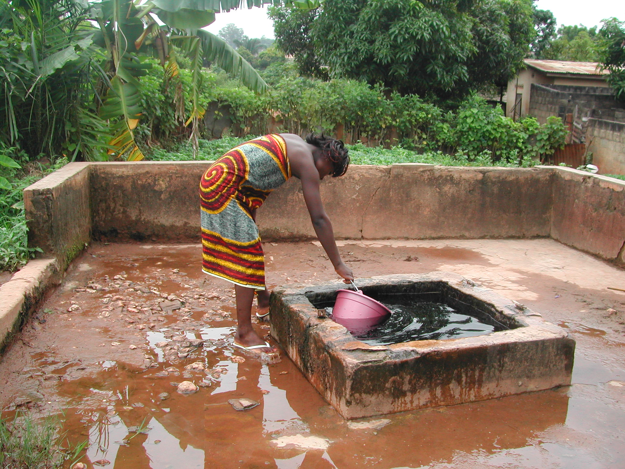 Puit historique créé depuis la période coloniale. Il est situé à Dimbokro. Précisément en Côte d'Ivoire